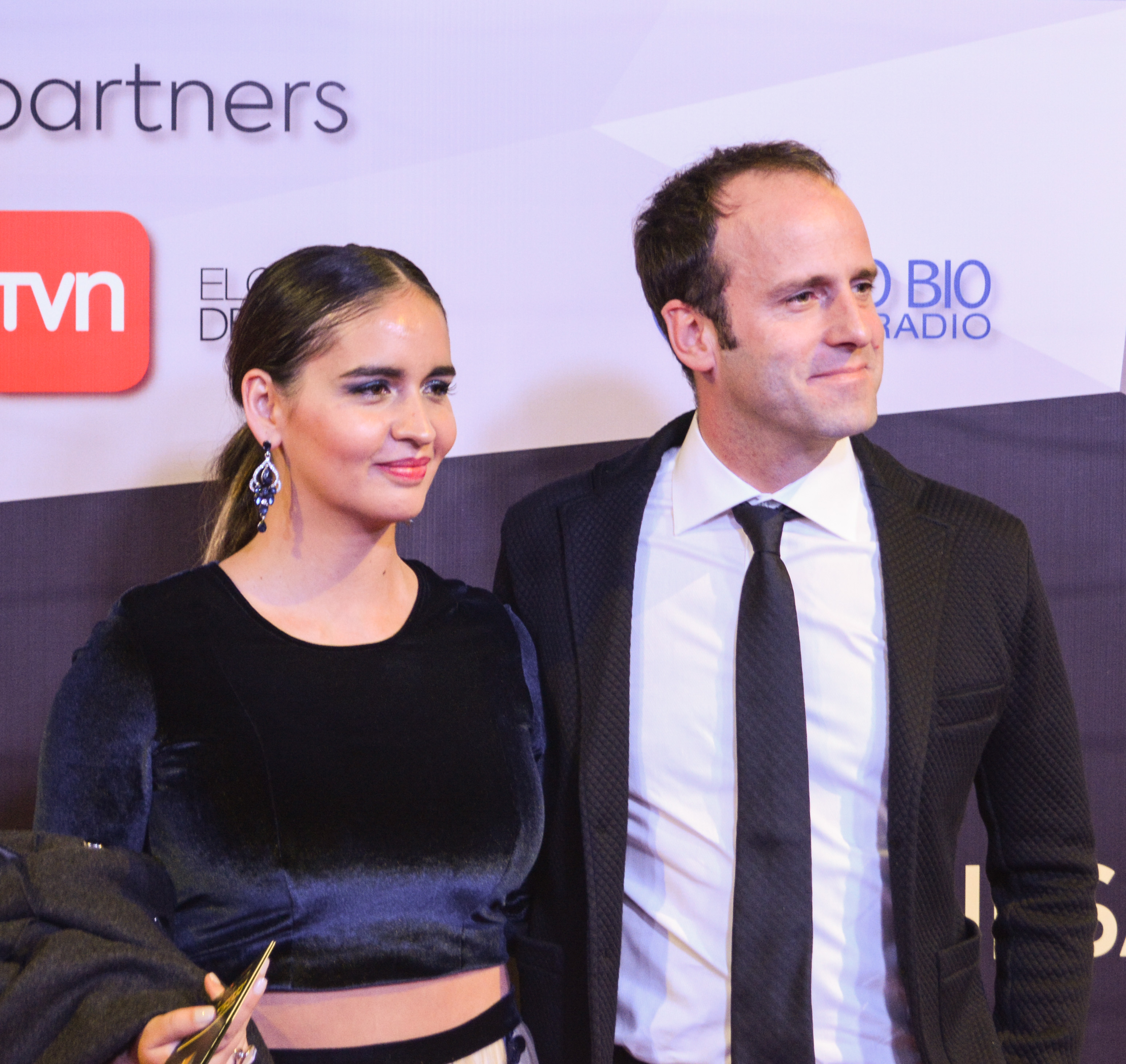 Premios Pulsar 2017